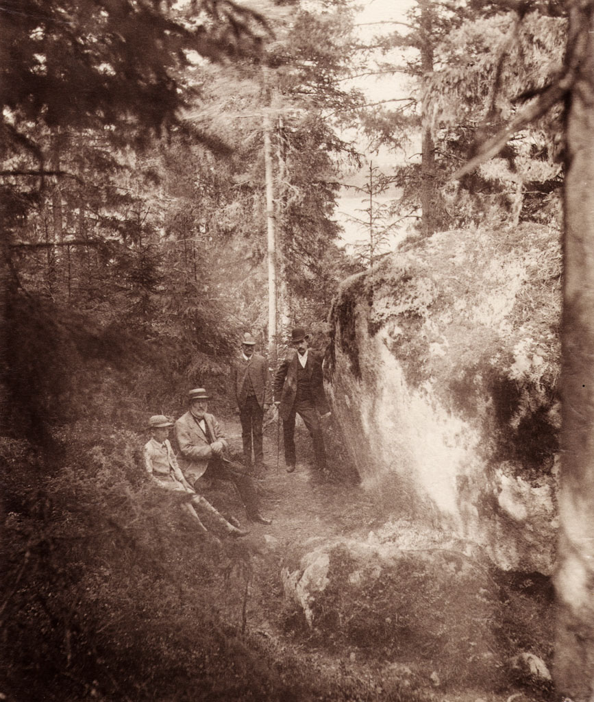 Sigurd Curman, Lundström (father-in-law of Carl Curman) and workers of the Lundström estate at boulder with runic inscription on two sides (U 112). The inscription on the south side says: "Ragnvaldr had the runes carved in memory of Fastvé, his mother, Ónæmr's daughter, (who) died in Eið. May God help her spirit". The inscripton on the west side says: "Ragnvaldr had the runes carved; (he) was in Greece, was commander of the retinue". Sigurd Curman, Lundström (Carl Curmans svärfar) och arbetare på Lundströms gård vid runblock med ristning på två sidor (U 112). Inskriften på södra sidan lyder: "Ragnvald lät rista runorna efter Fastvi sin moder, Onäms dotter, hon dog i Ed. Gud hjälpe hennes ande". Inskriften på den västra sidan lyder: "Runorna lät Ragnvald rista. Han var i Grekland, han var krigerföljets hövding". Read more about the photo database (in english)